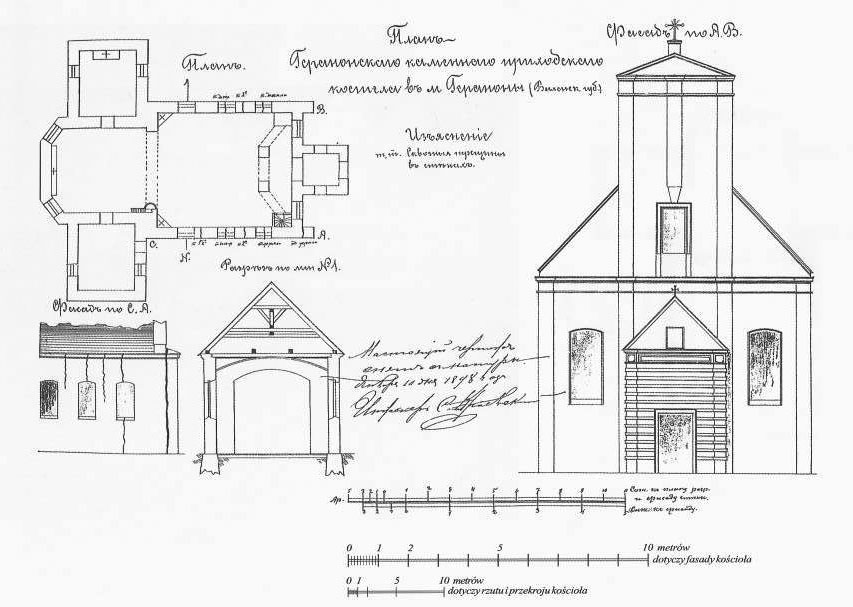 Беларуская (тарашкевіца): Касьцёл Сьвятога Мікалая ў Геранёнах